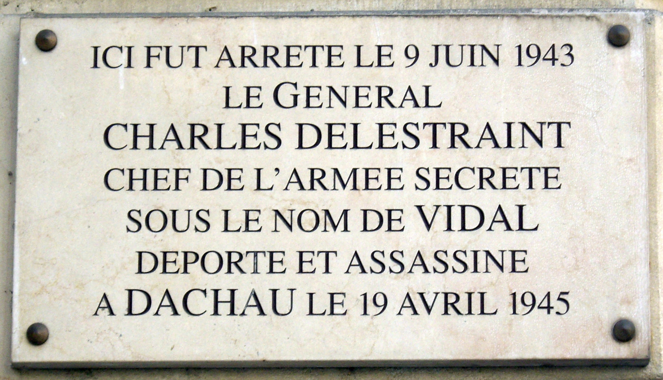 Plaque apposée au n° 11 de la chaussée de la Muette, Paris 16e, marquant l'emplacement où fut arrêté le général Charles Delestraint, chef de l'Armée secrète (1879-1945), le 9 juin 1943.